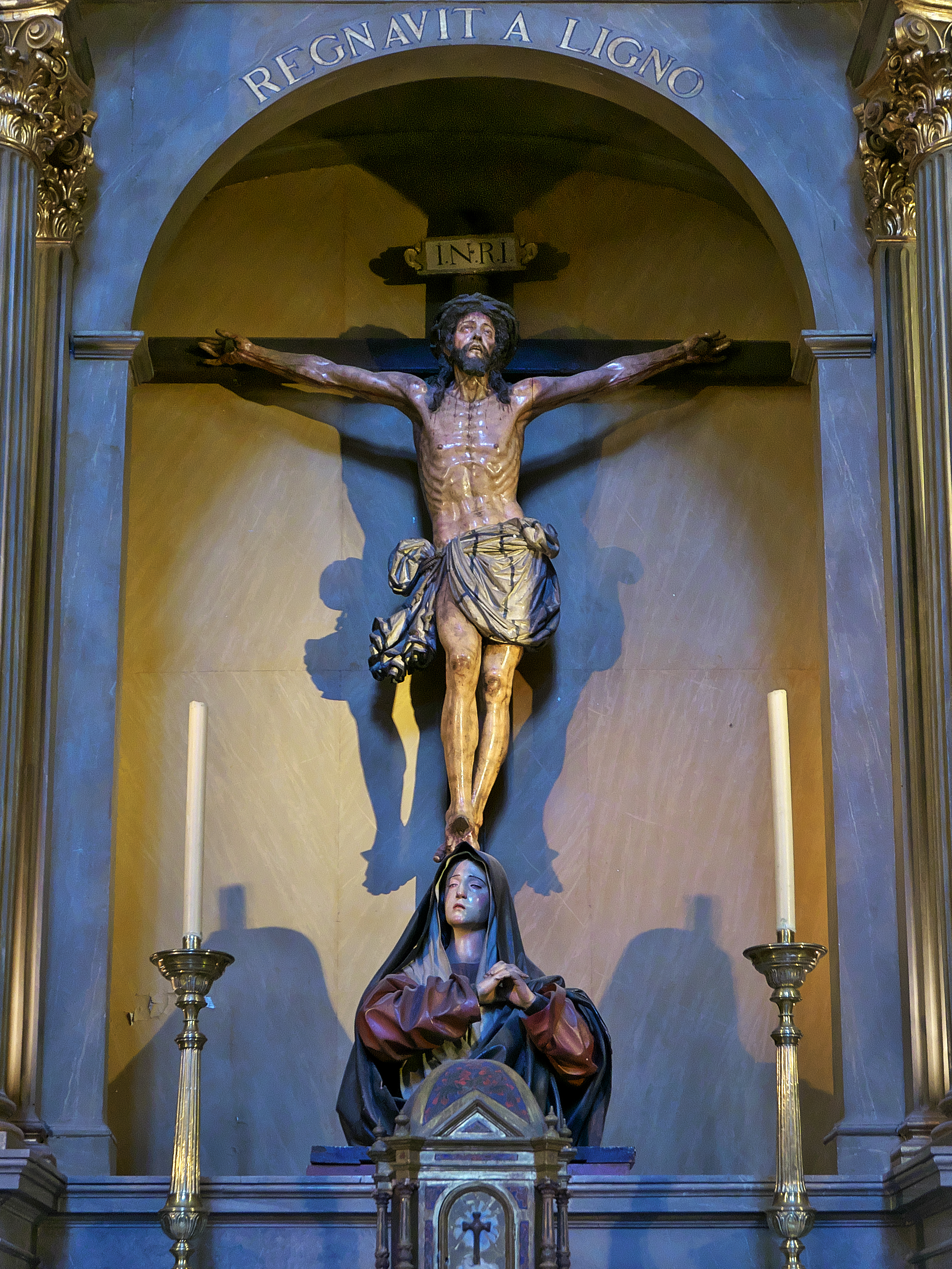 Capilla del Cristo de las Victorias, Catedral de Málaga. Crucificado de Alonso de Mena (1630-1640).